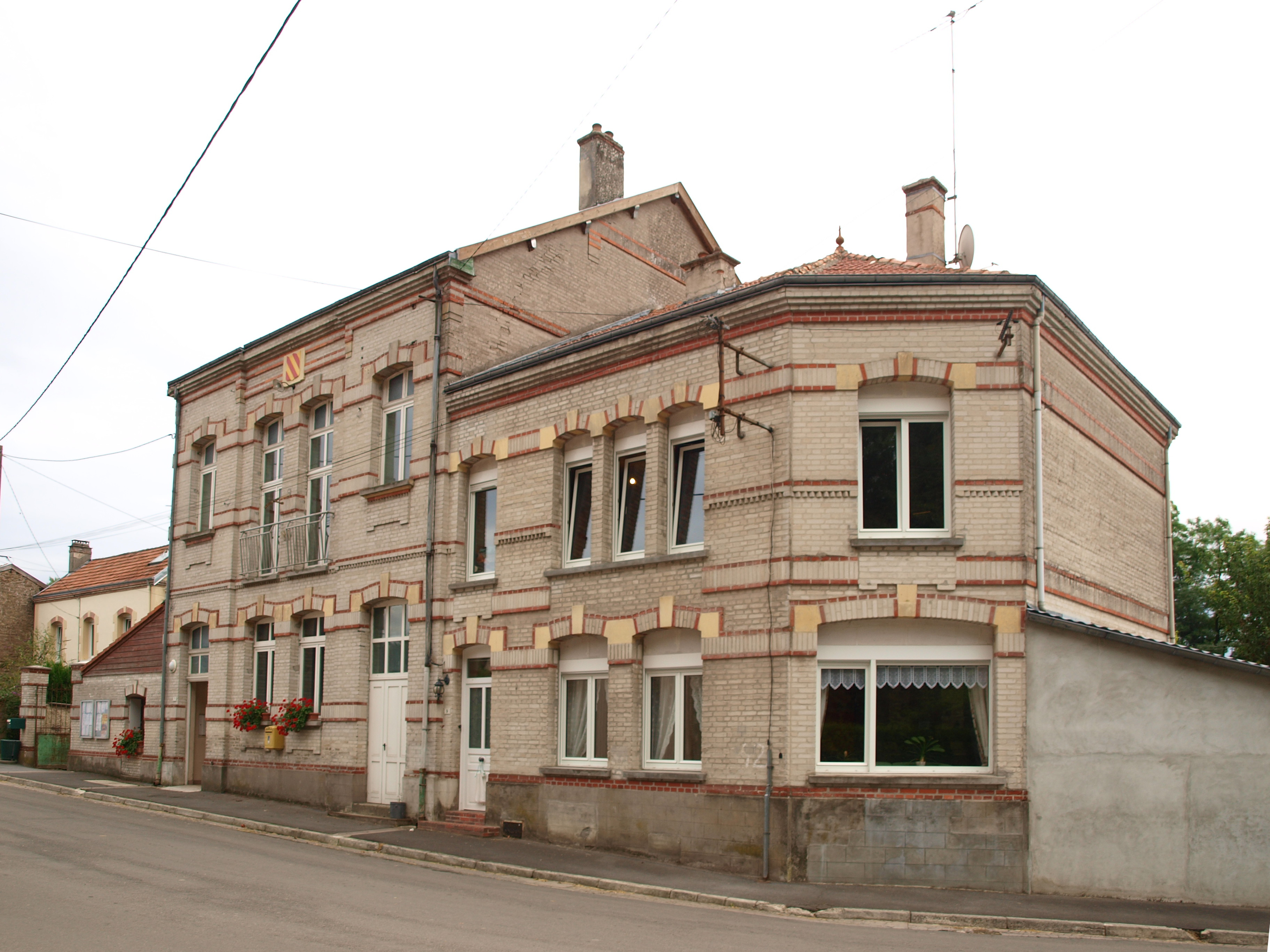 Autry (Ardennes, France) ; mairie.